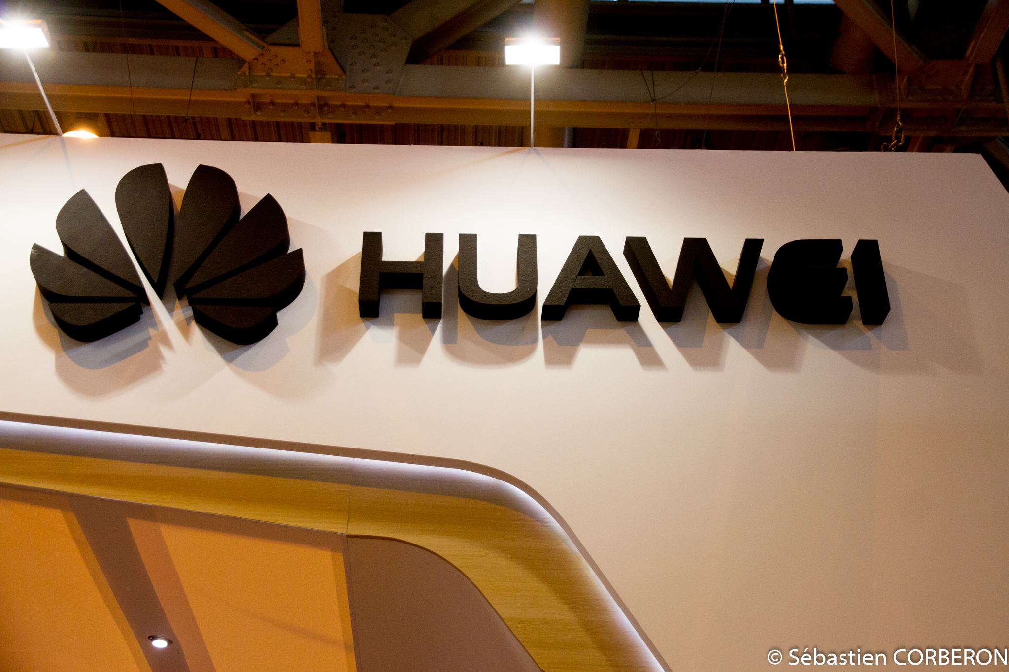 Salon de la photo de Paris, 5 November 2015, Paris expo Porte de Versailles.